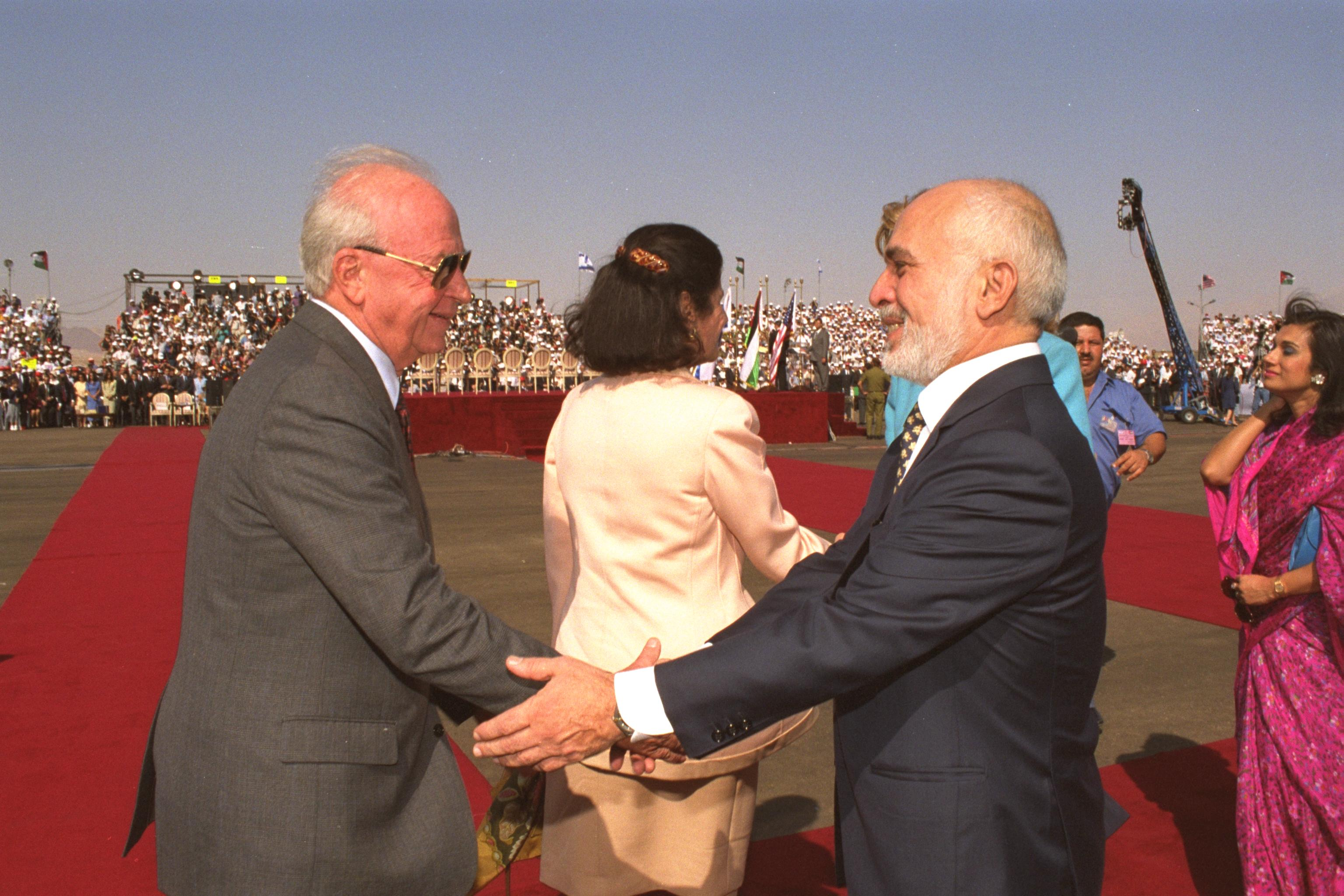 PM Yizhak Rabin and Jordan's King Hussein greet each other at the Arava Border Terminal prior to the signing of the peace treaty between their countries. ראש הממשלה יצחק רבין לוחץ ידו של חוסיין מלך ירדן בהגיעו לטקס חתימת חוזה השלום בין שתי המדינות, במסוף הערבה ליד אילת ועקבה. Photo: SAAR YAACOV, 10/26/1994